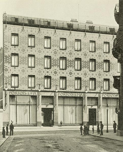 Firmengebäude Portois & Fix an der Ungargasse, von Max Fabiani.